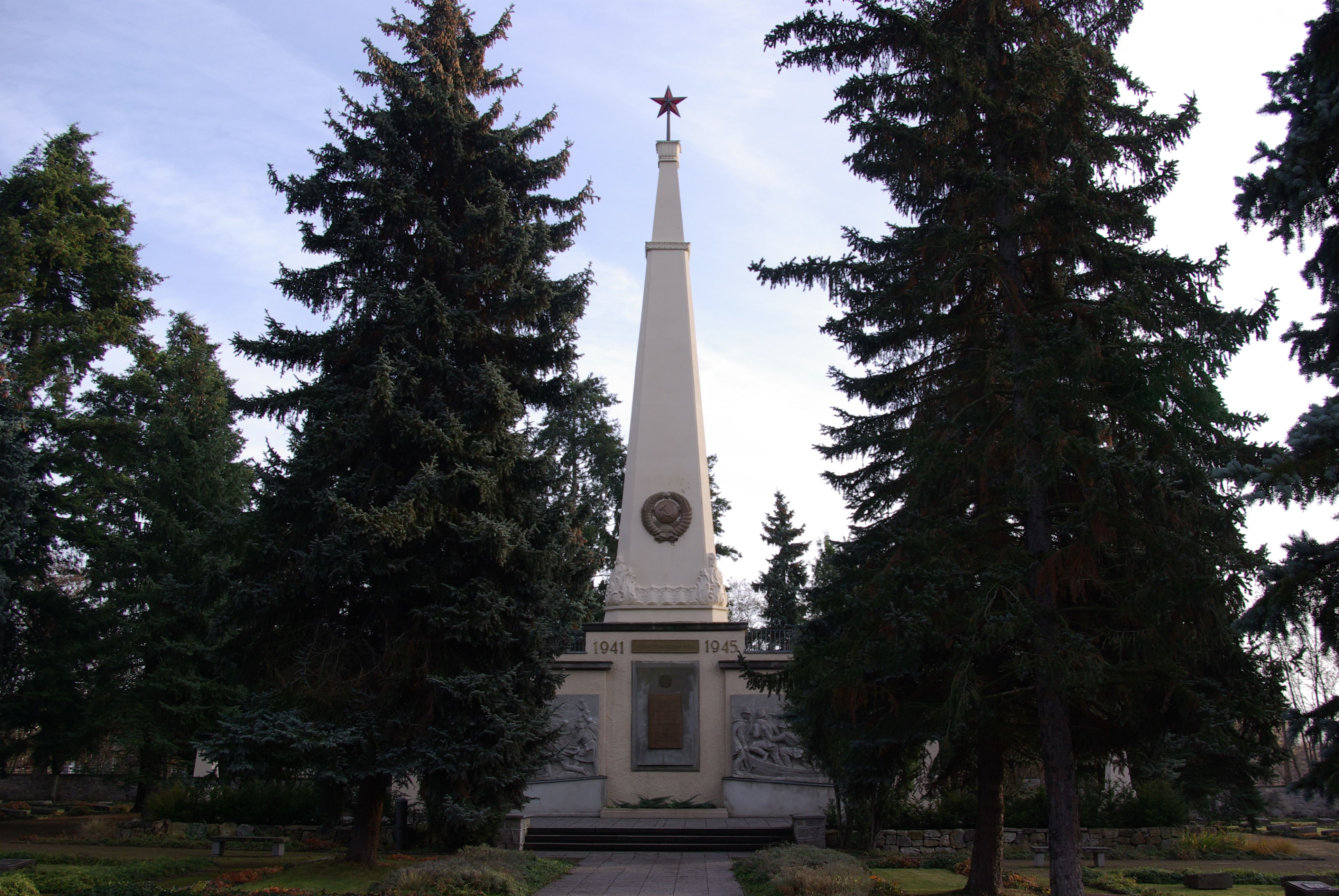 Baruth/Mark in Brandenburg. Der Sowjetischer Ehrenfriedhof liegt an der B 96 nördlich von Baruth und steht unter Denkmalschutz.